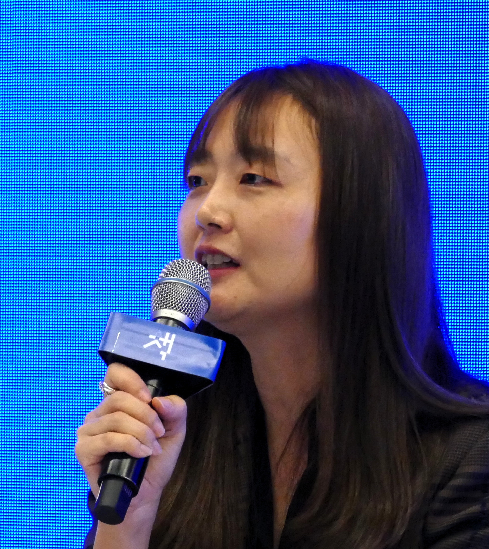 Kim Keum-hee på Bokmässan i Göteborg 2019.